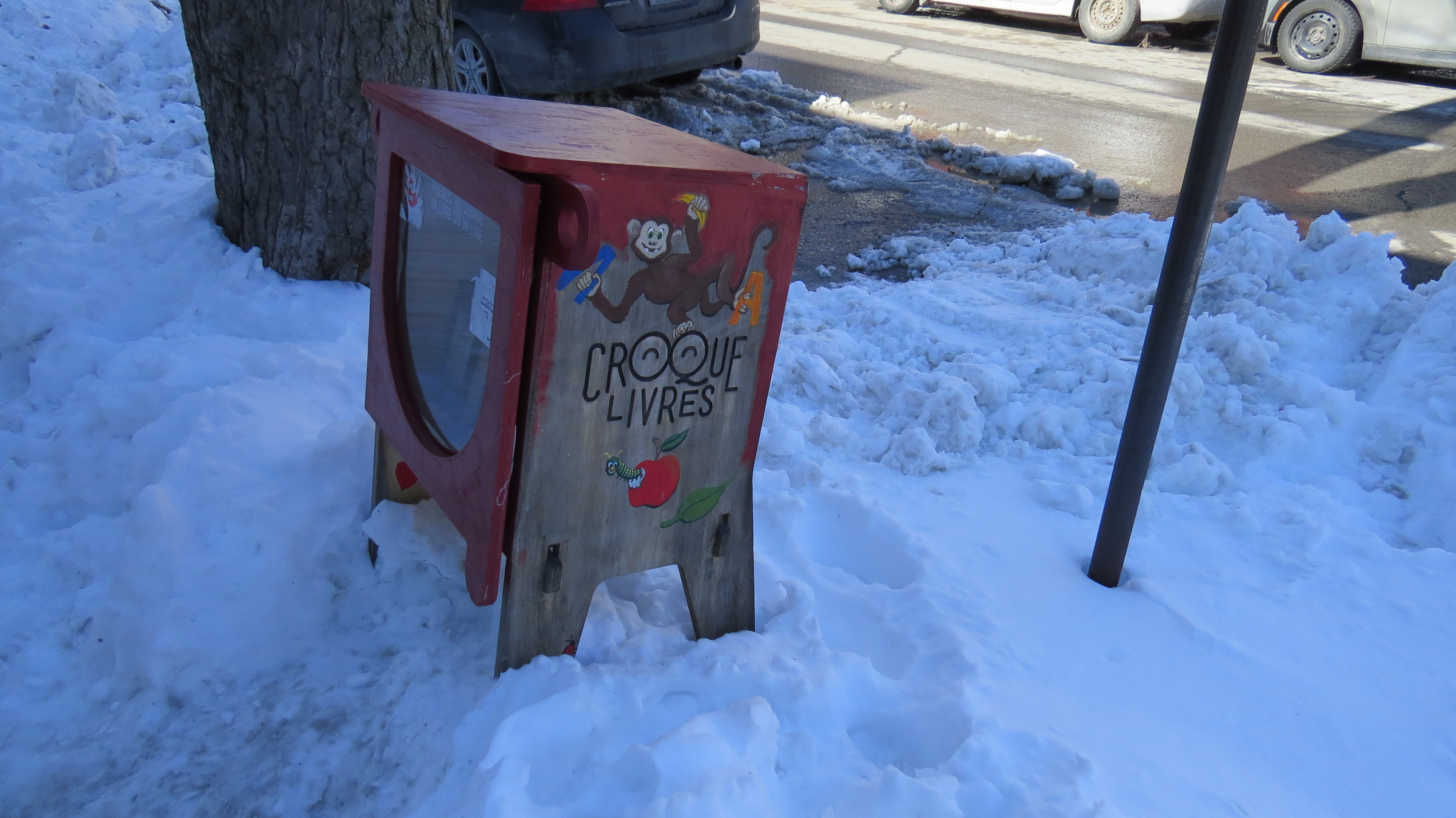 livre à donner Coin Henri-Julien et avenue de Gaspé Villeray